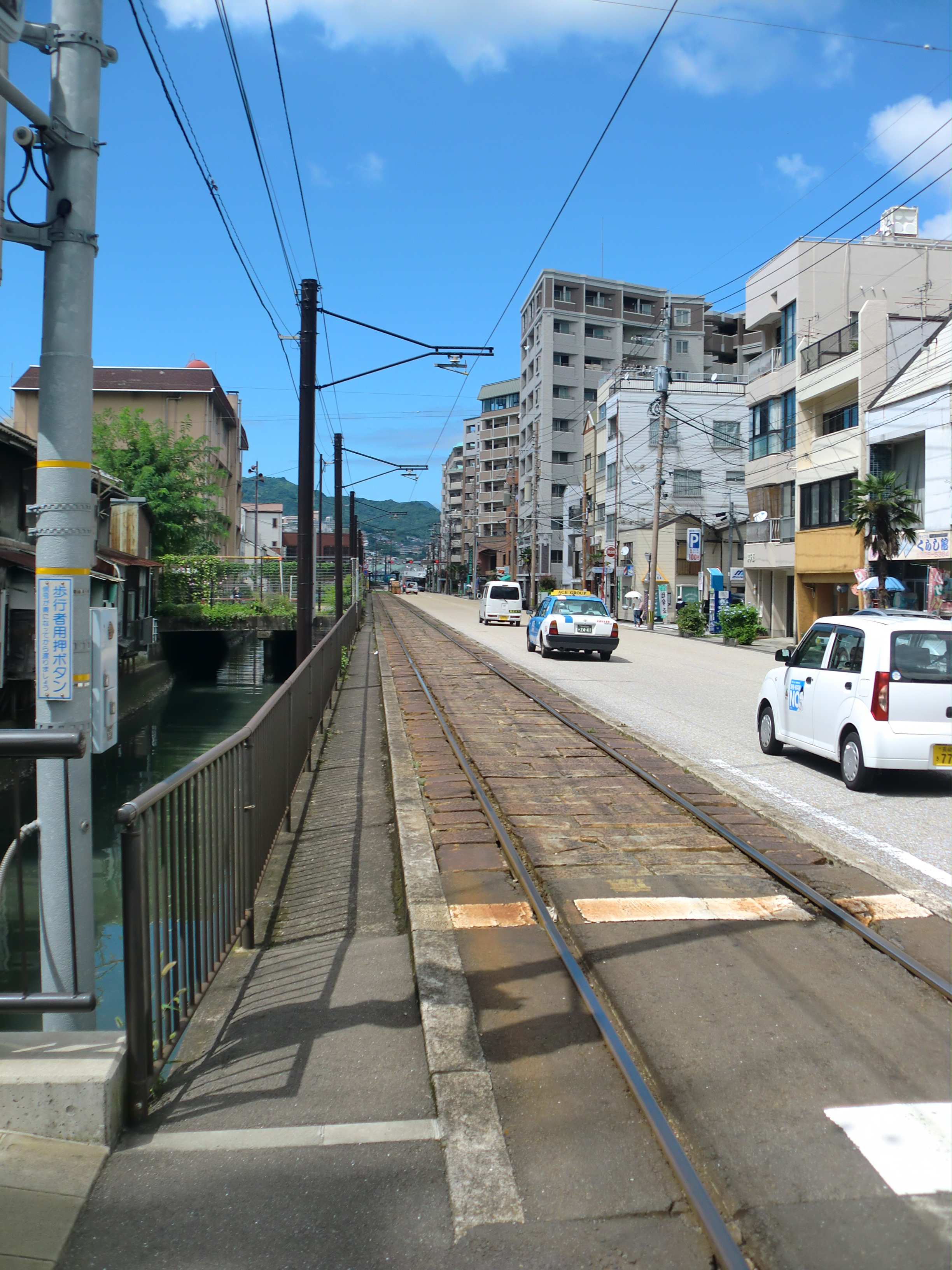 長崎電気軌道石橋停留場-大浦天主堂下停留場の線路